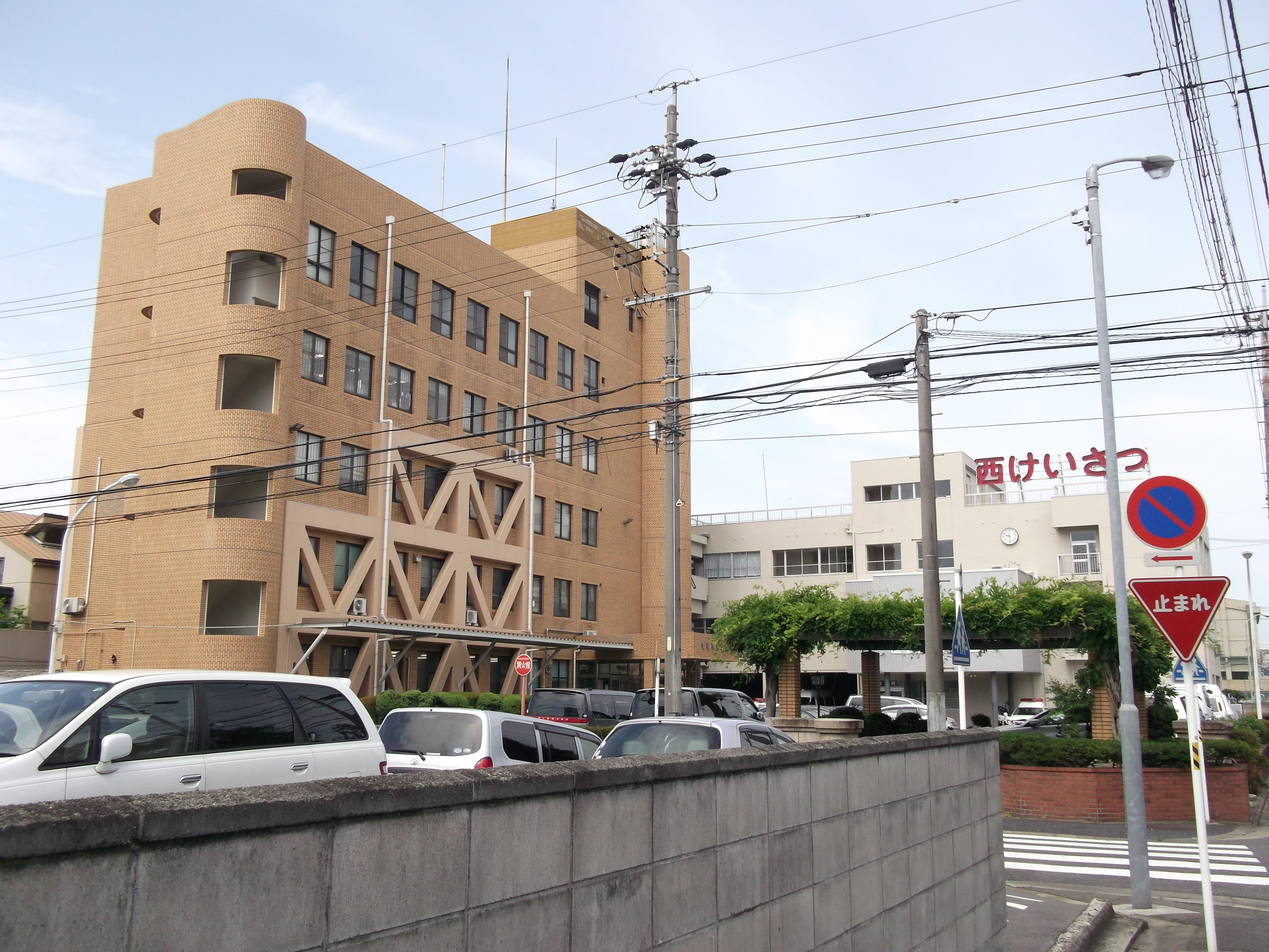 名古屋市西区天神山町の愛知県警察西警察署を北側公道東側より撮影